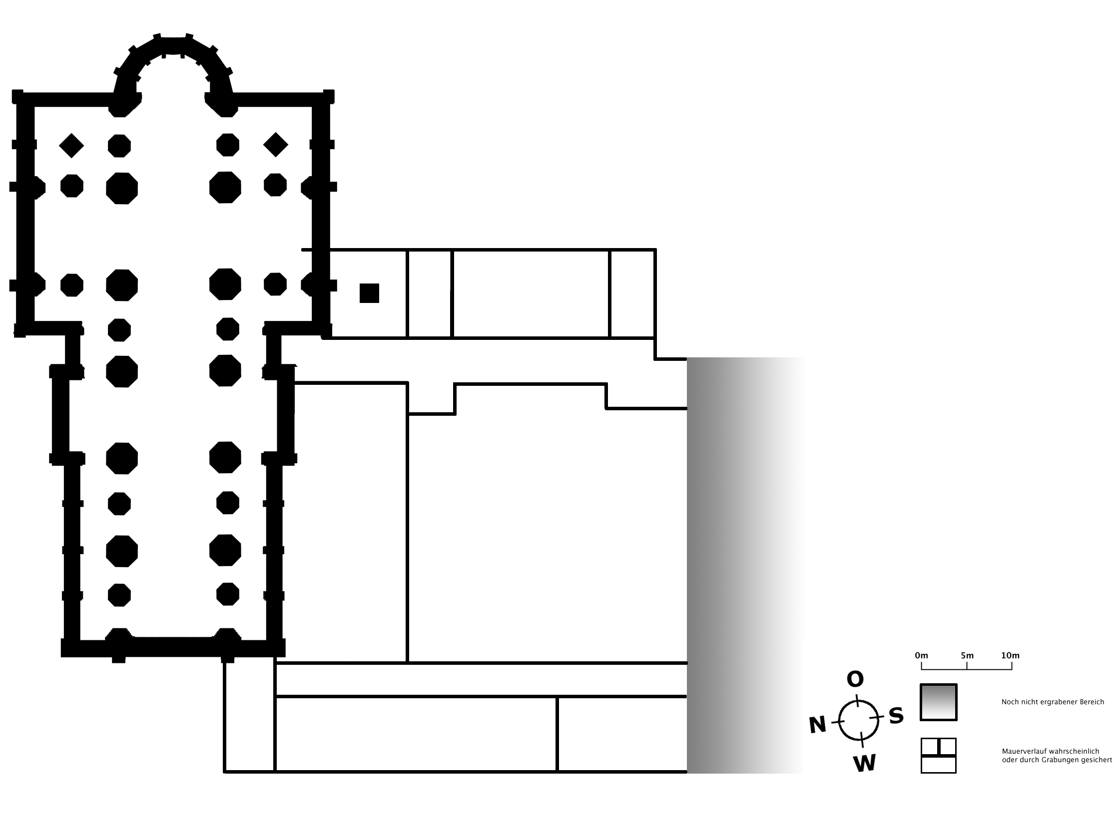 Rekonstruierter Grundriss von Kirche und Klausur des Klosters Ihlow. Bauzustand des 15./16. Jahrhunderts. Nachzeichnung eines im öffentlich zugänglichen Schaukasten auf dem Klostergelände angebrachten Planes. Laut dortiger Angaben fertigten Marion Brüggler und Bernhard Thiemann den Plan.